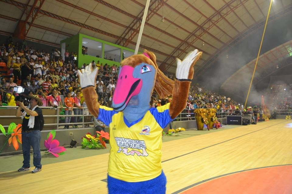 Foto da Mascote Pisinga no II Mundial Feminino de Futebol de Salão, na Colômbia, em 2013